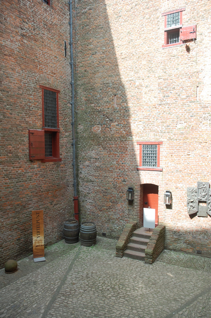 De binnenplaats.